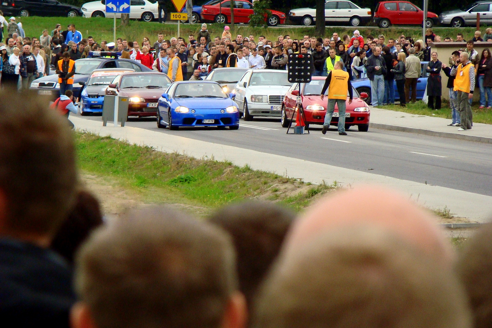 Wyścig na 1/4 mili. Gorzów Wlkp.,ul. Złotego smoka.